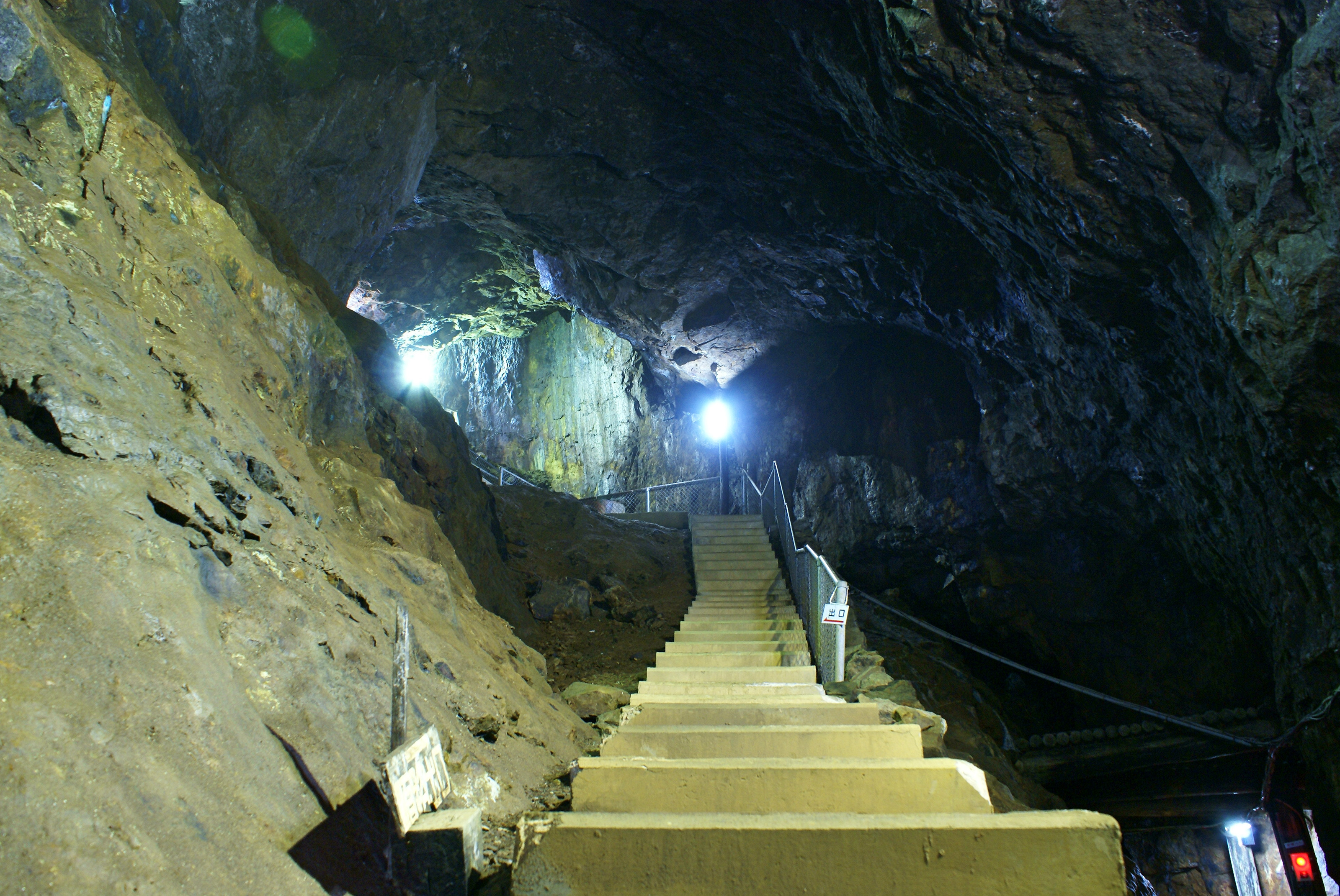 Sasaune gallery of Yoshioka copper mine, Takahashi, Okayama, Japan